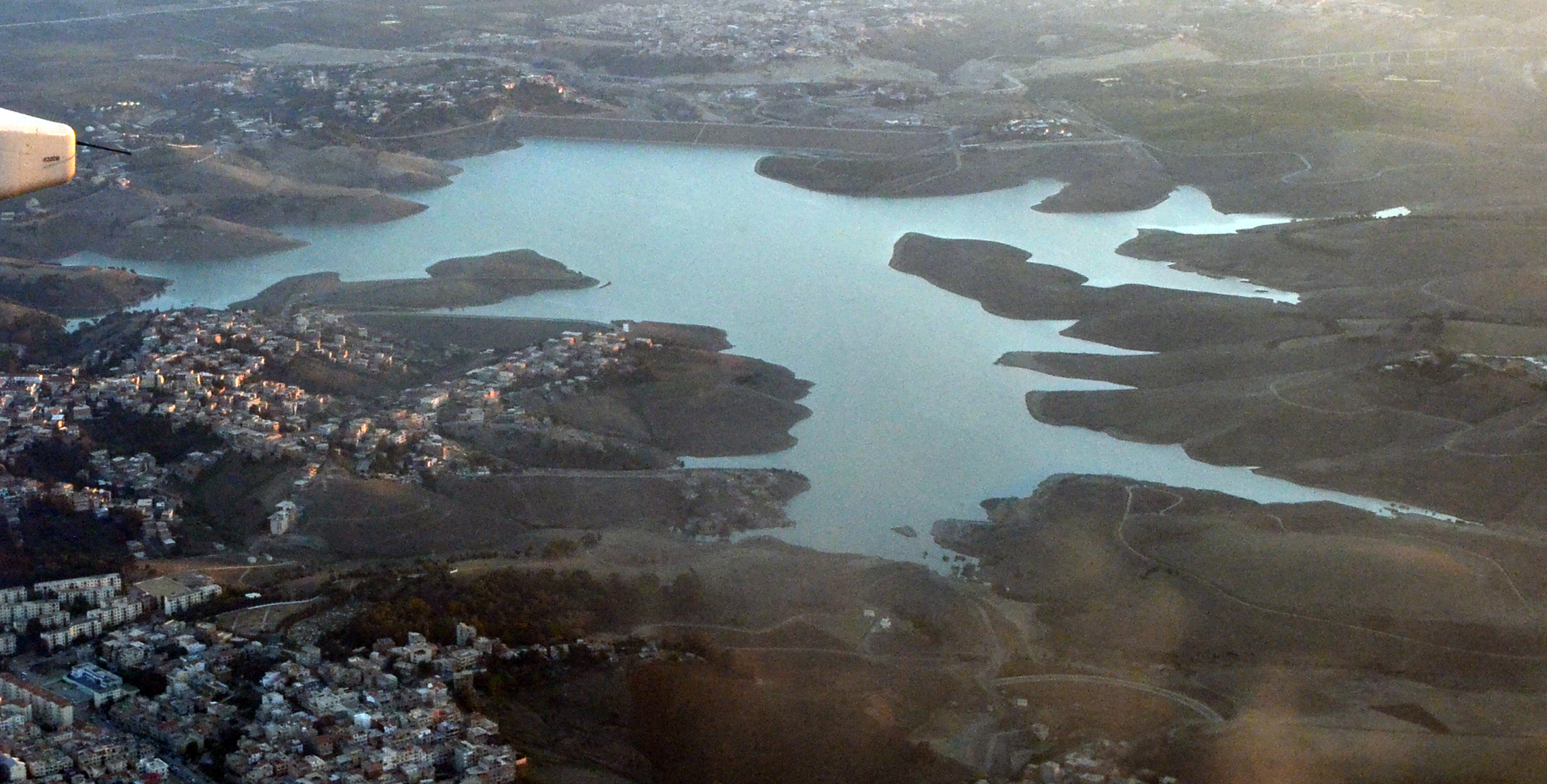 Vue aérienne du barrage de Douera